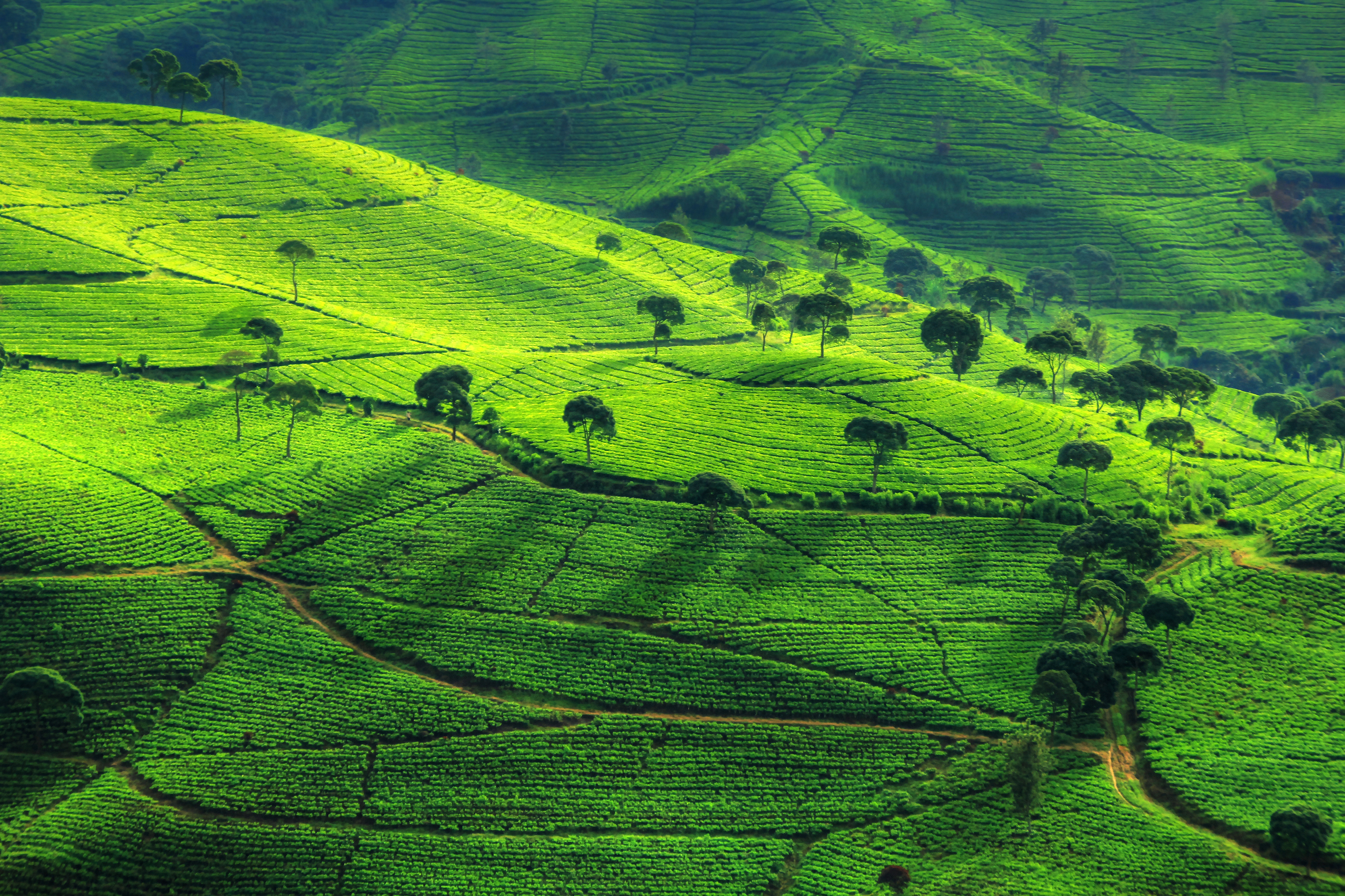 "Cukul" merupakan salah satu perkebunan teh di daerah pangalengan jawa barat indonesia, yang memiliki pemandangan indah ketika sunrise